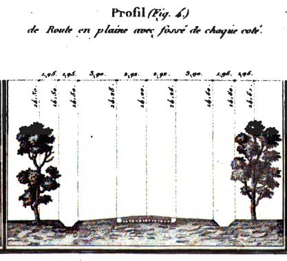 Technique d’empierrement des chaussées selon Tresaguet